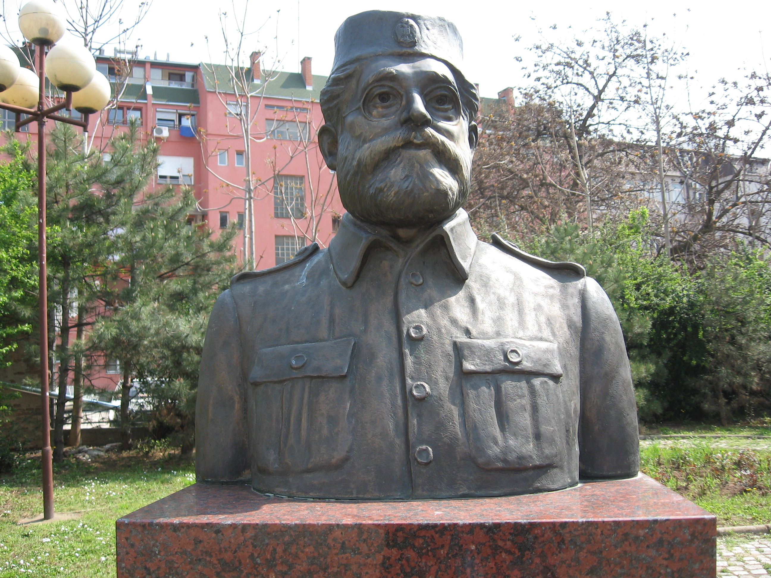 Spomenik Drazi Mihalovica u Nisu.